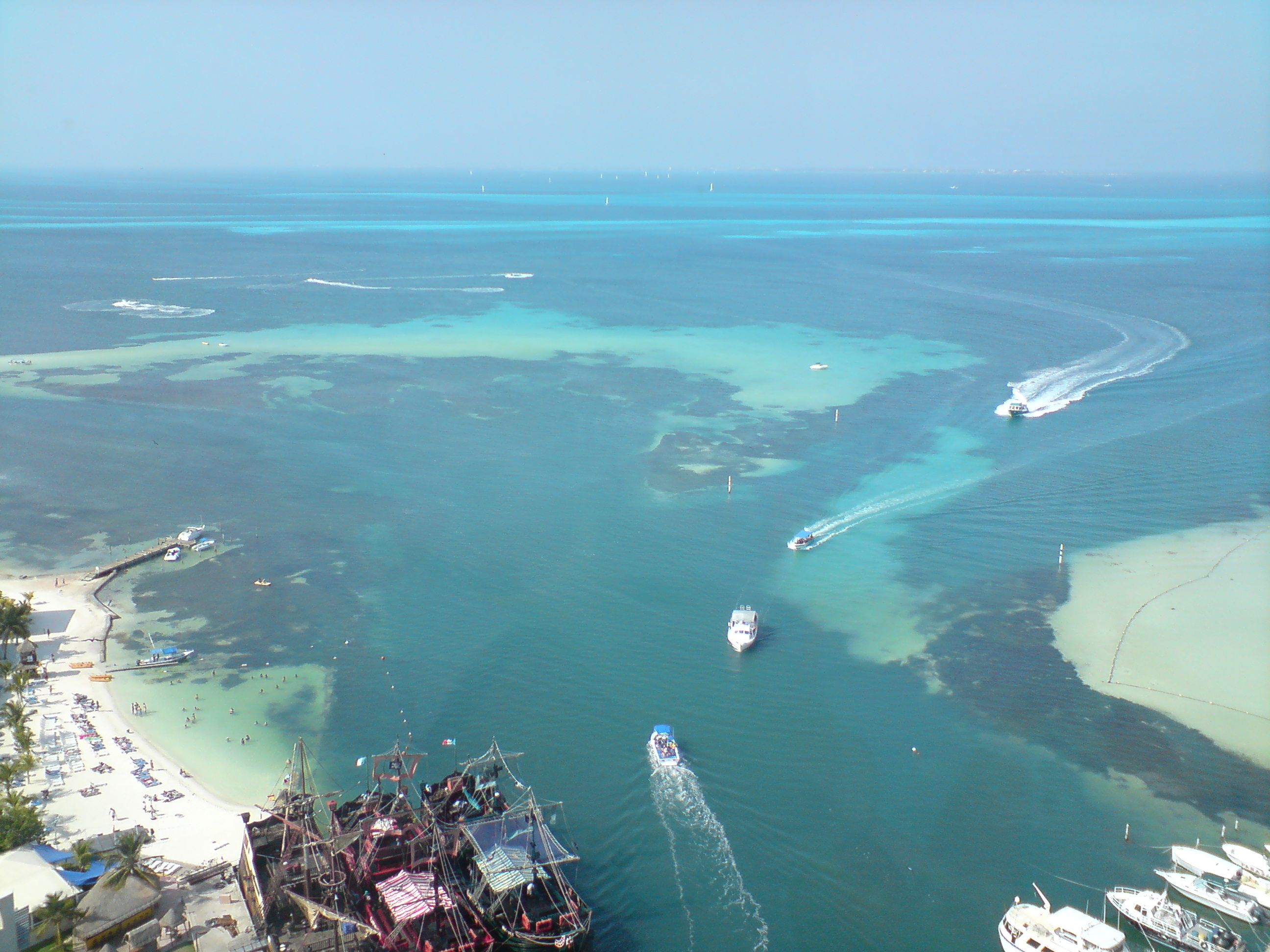 Bahía de Mujeres, vista aérea desde la Torre Escénica